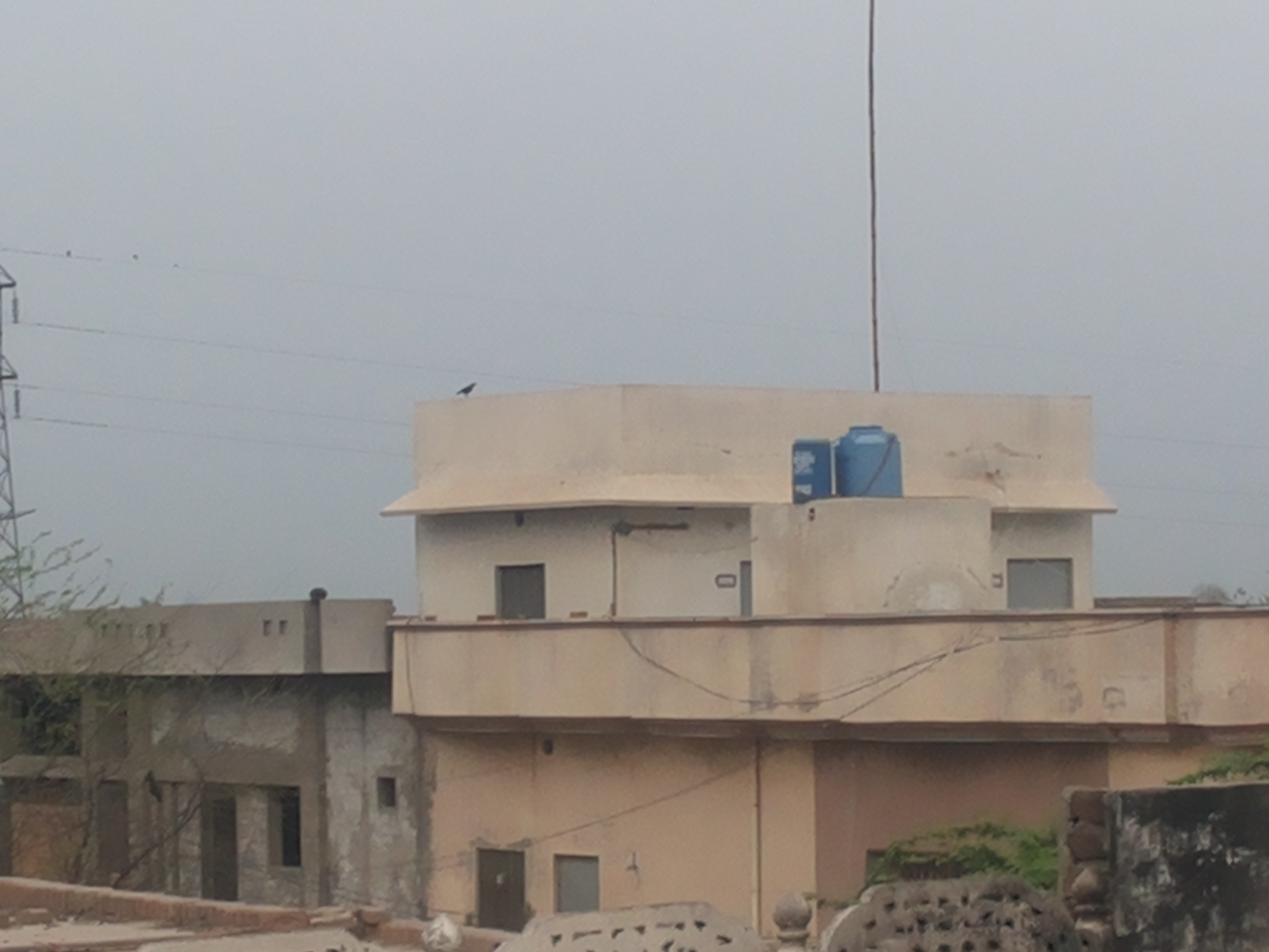 chak 427